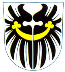 wappen von solnice